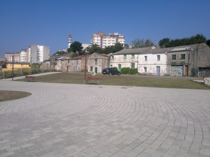 O Corgo, Oza, A Coruña (Galiza)